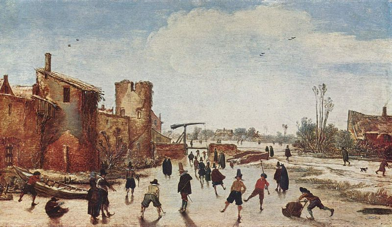 Esaias